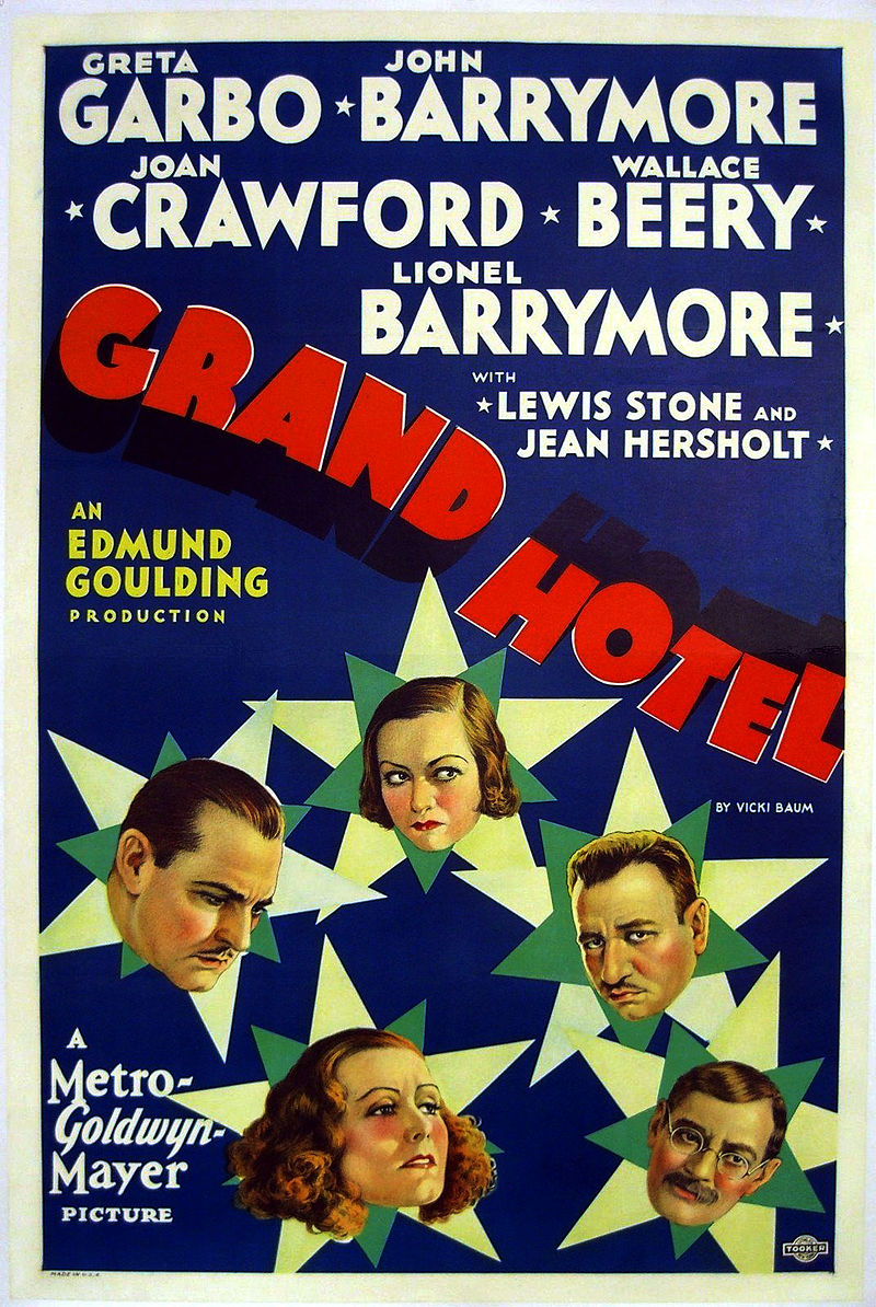 Cartel anunciador de la película Grand Hotel